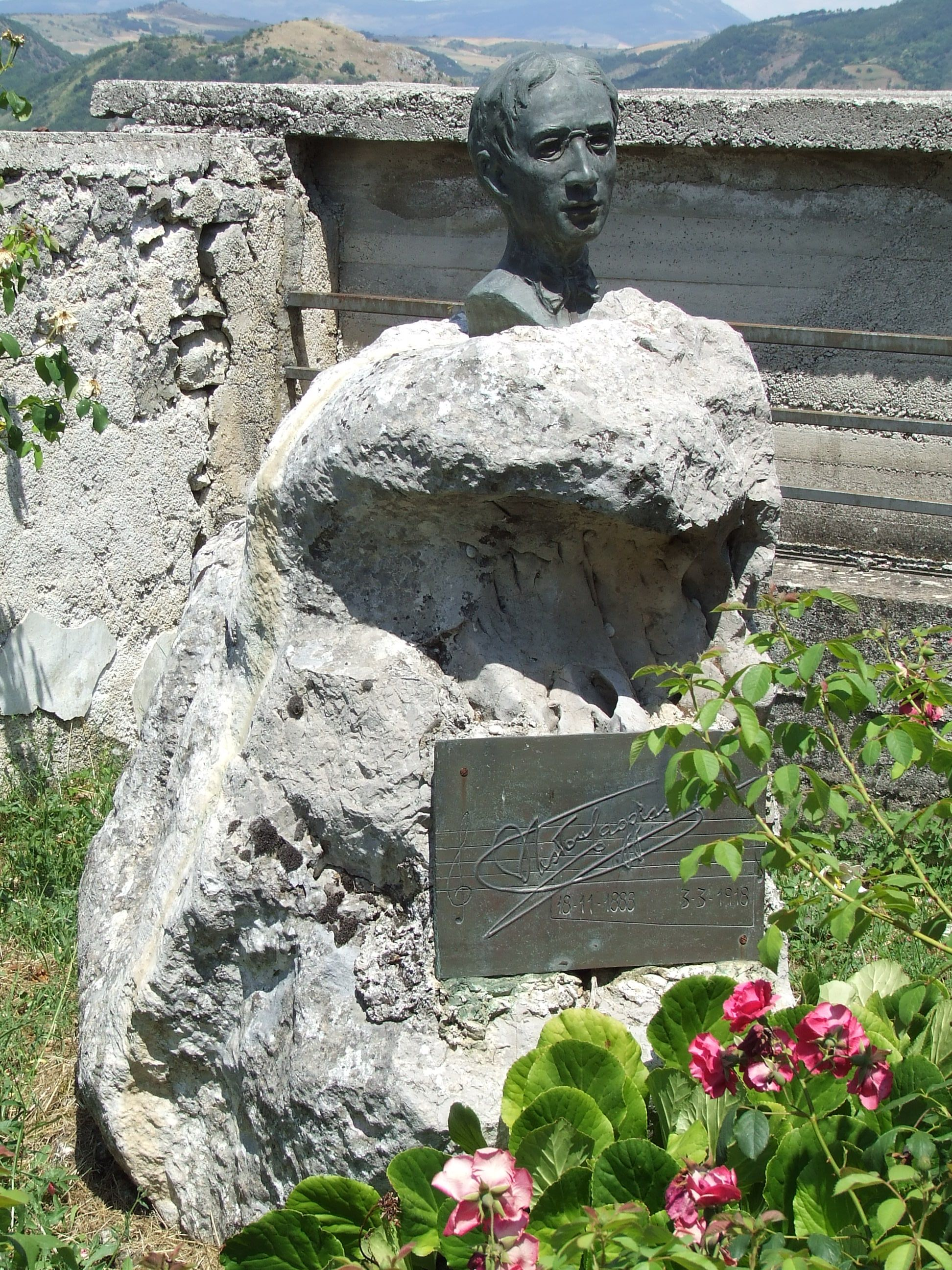 Busto che ricorda il compositore Nestore Caggiano nel cimitero di Caggiano.